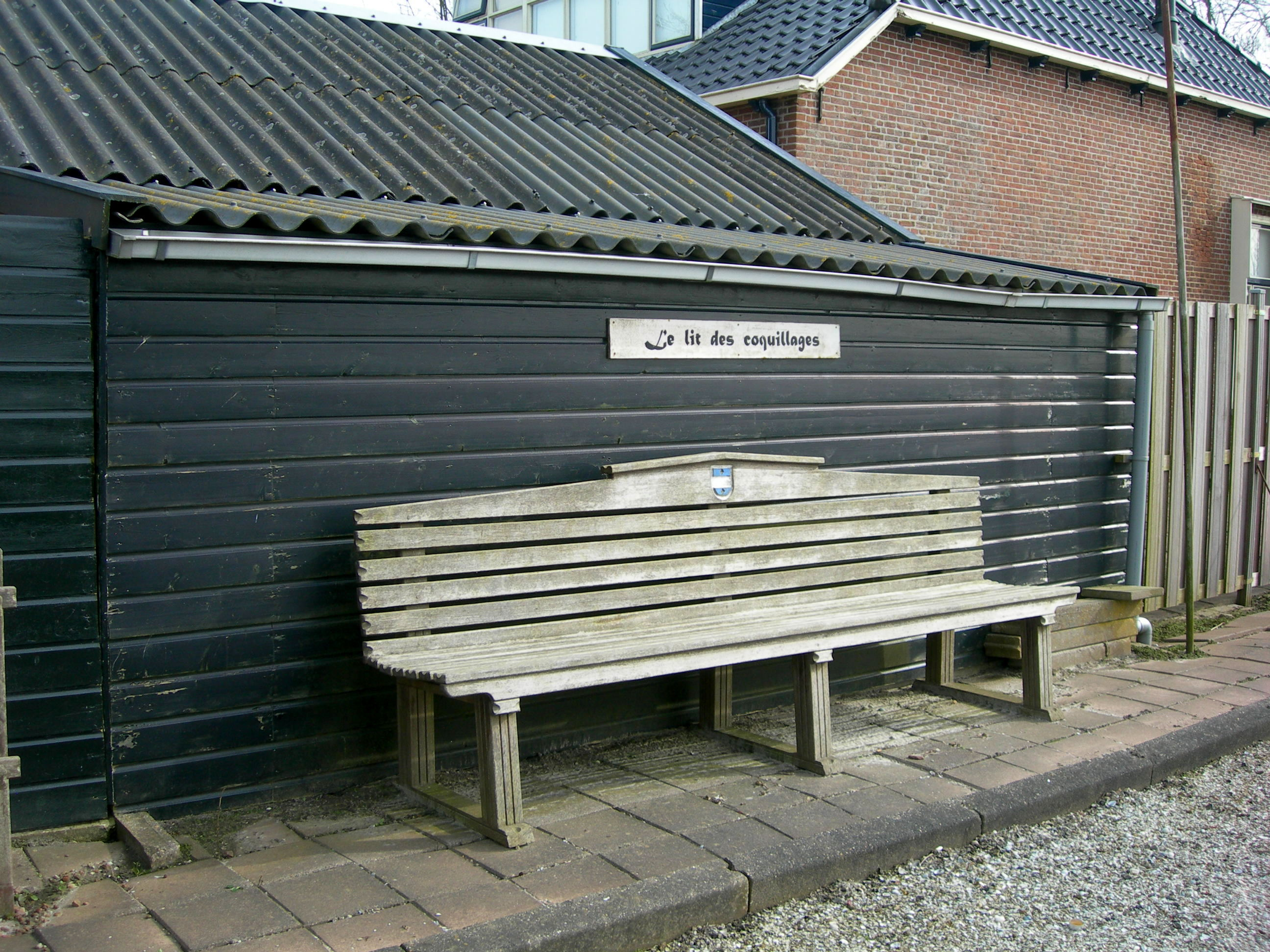 Bankje-Le lit des coquillages.